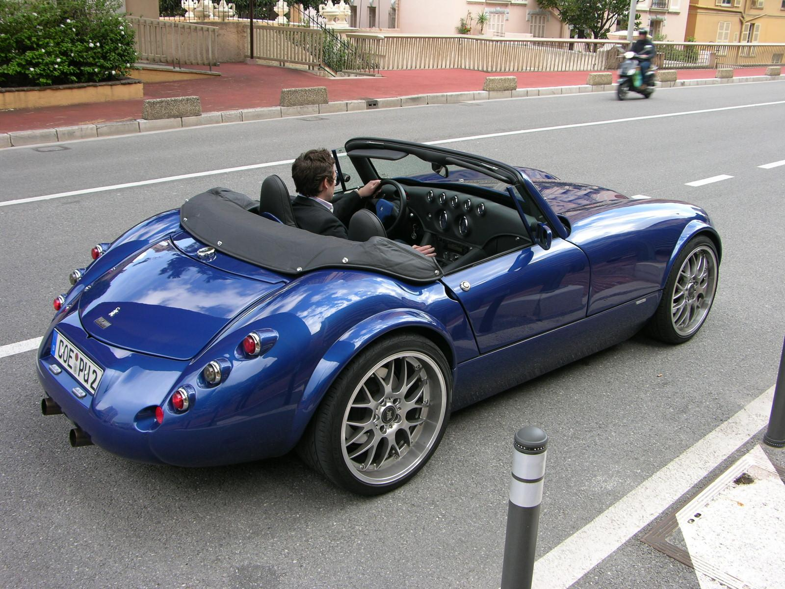 Wiesmann Roadster MF3